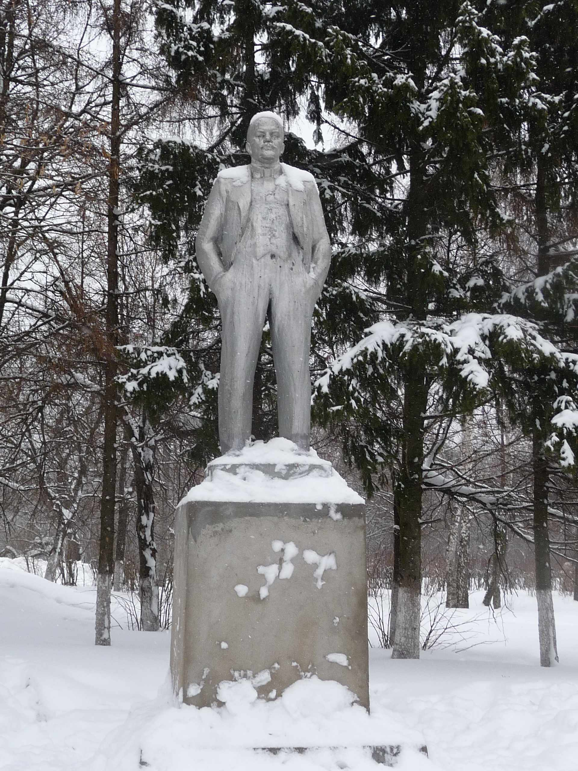 Памятник Ленину в селе Мизиново Щелковский район Московской области Российской Федерации